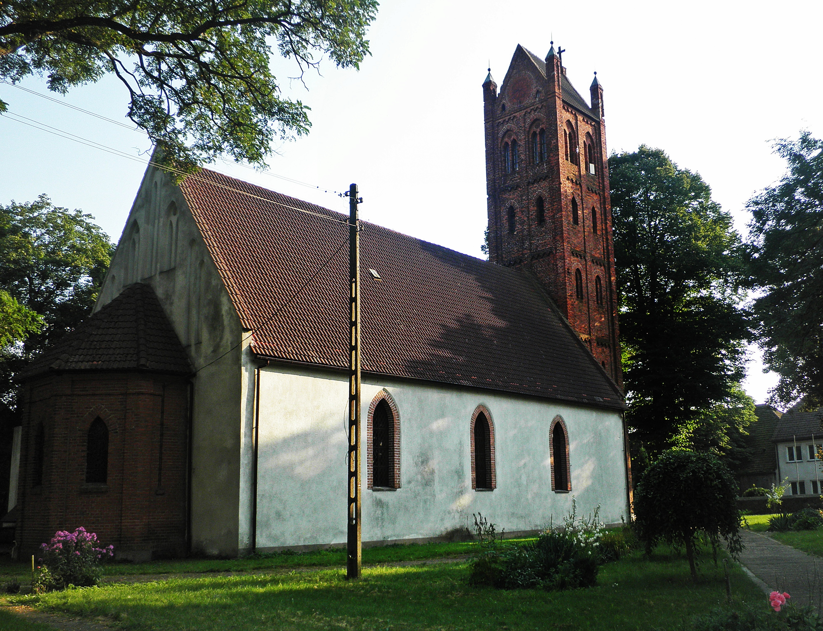 Kościół parafialny pw. Matki Bożej Królowej Polski w Bielicach.